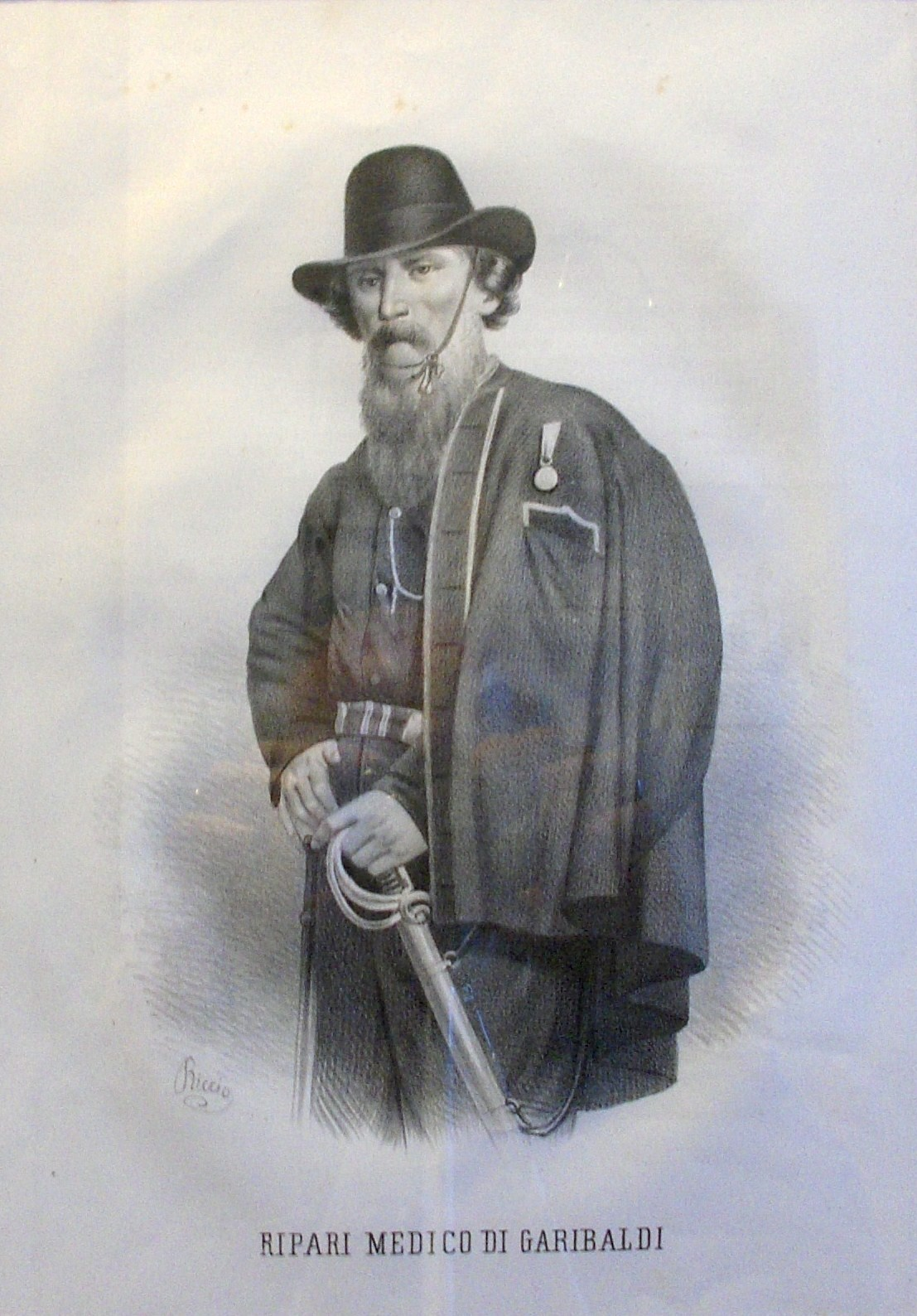 Pietro Ripari, medico di Garibaldi,litografia, incisore Riccio, Napoli 1860. Sta in :Valente, Domenico: La guerra del 1859 esposta con documenti originali e illustrata con litografie e una carta geografica - Napoli, Duclere, 1860